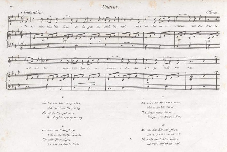 In einem kühlen Grunde, vertont von Friedrich Glück